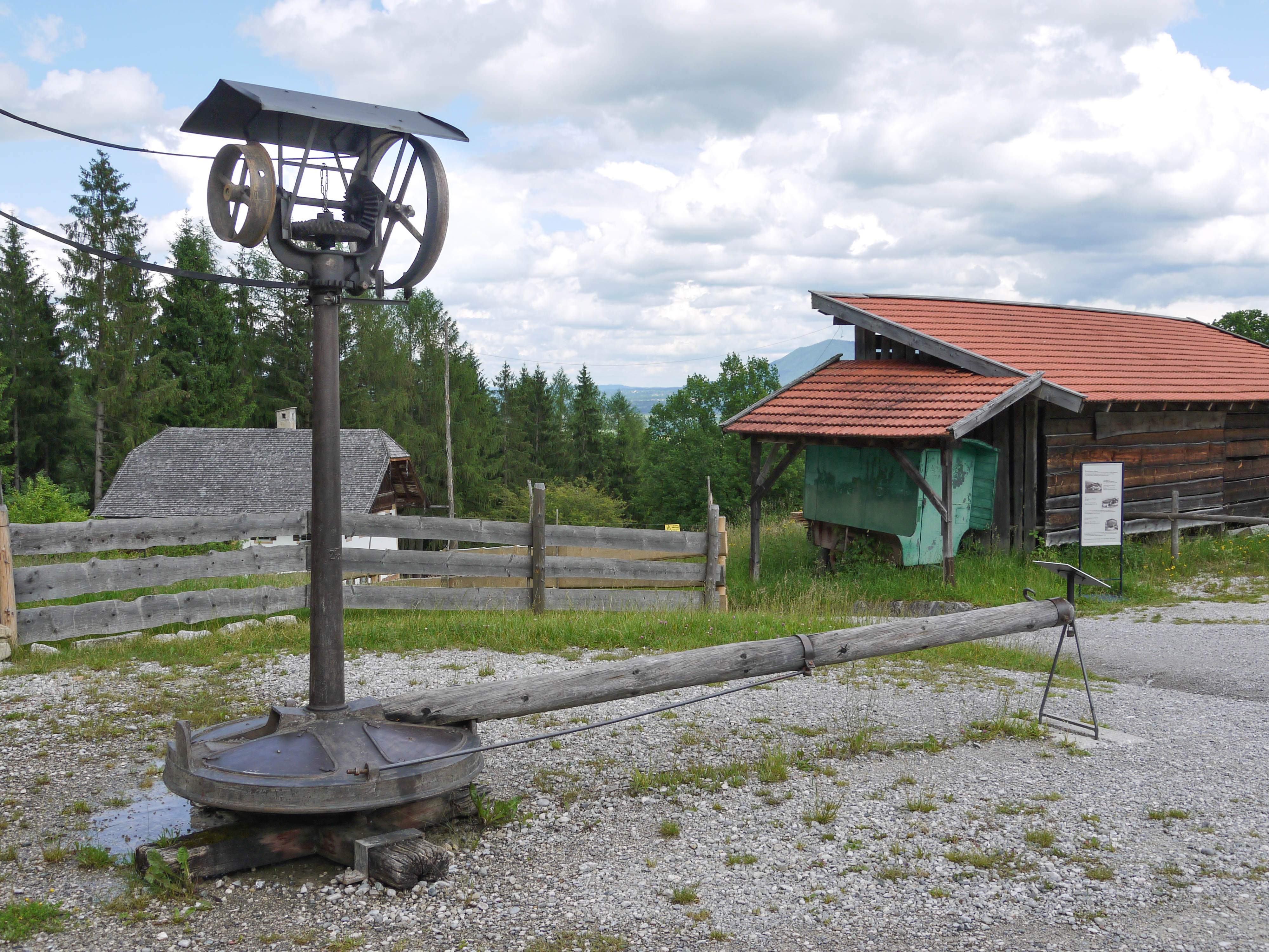 Freilichtmuseum Glentleiten: Säulengöpel am Bundwerkstadel aus Albaching zum Antrieb von Dresch- und Futterschneidemaschinen oder Kreissägen (Anfang 20. Jh.)